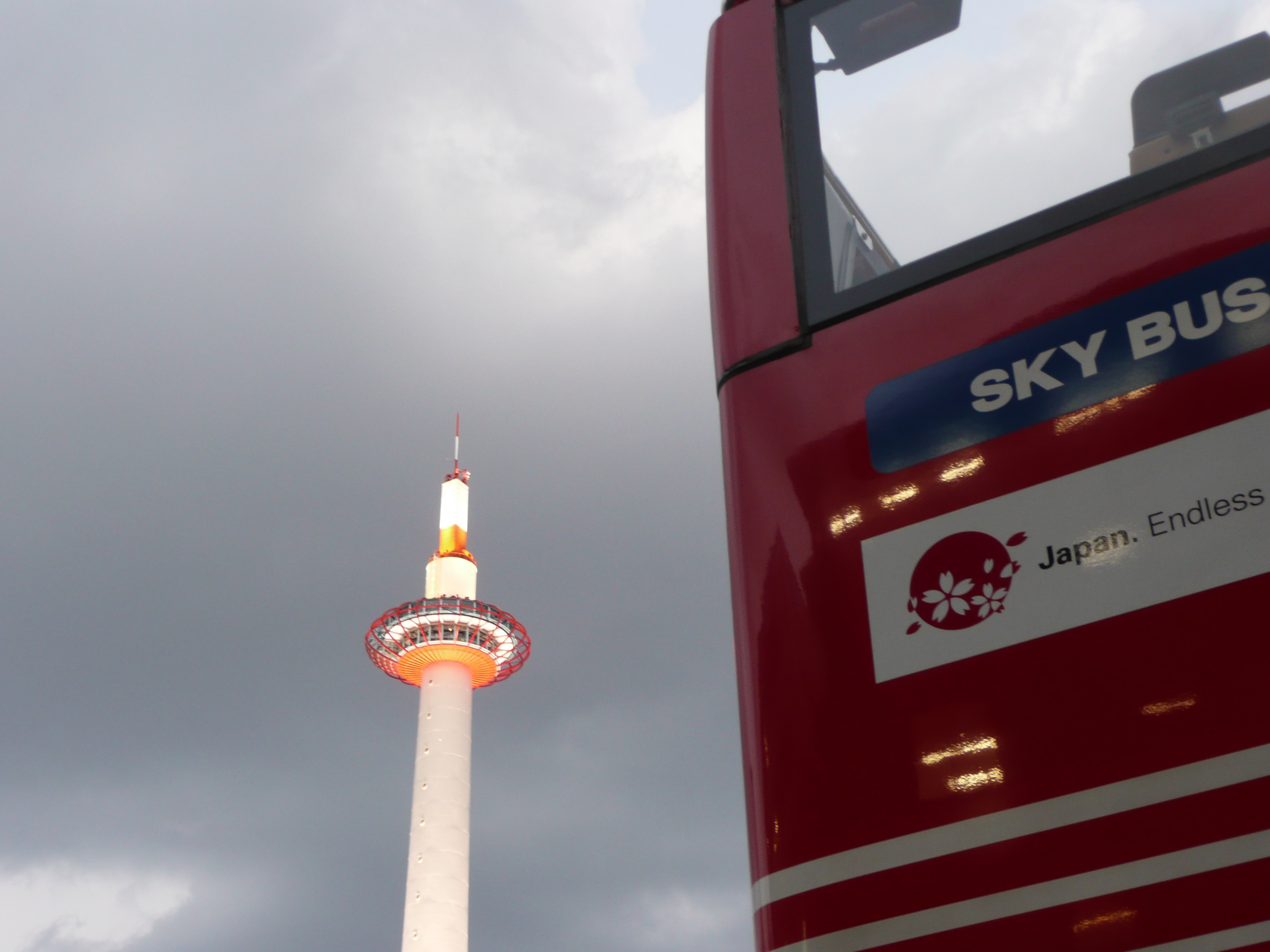 夏の夕涼みドライブ